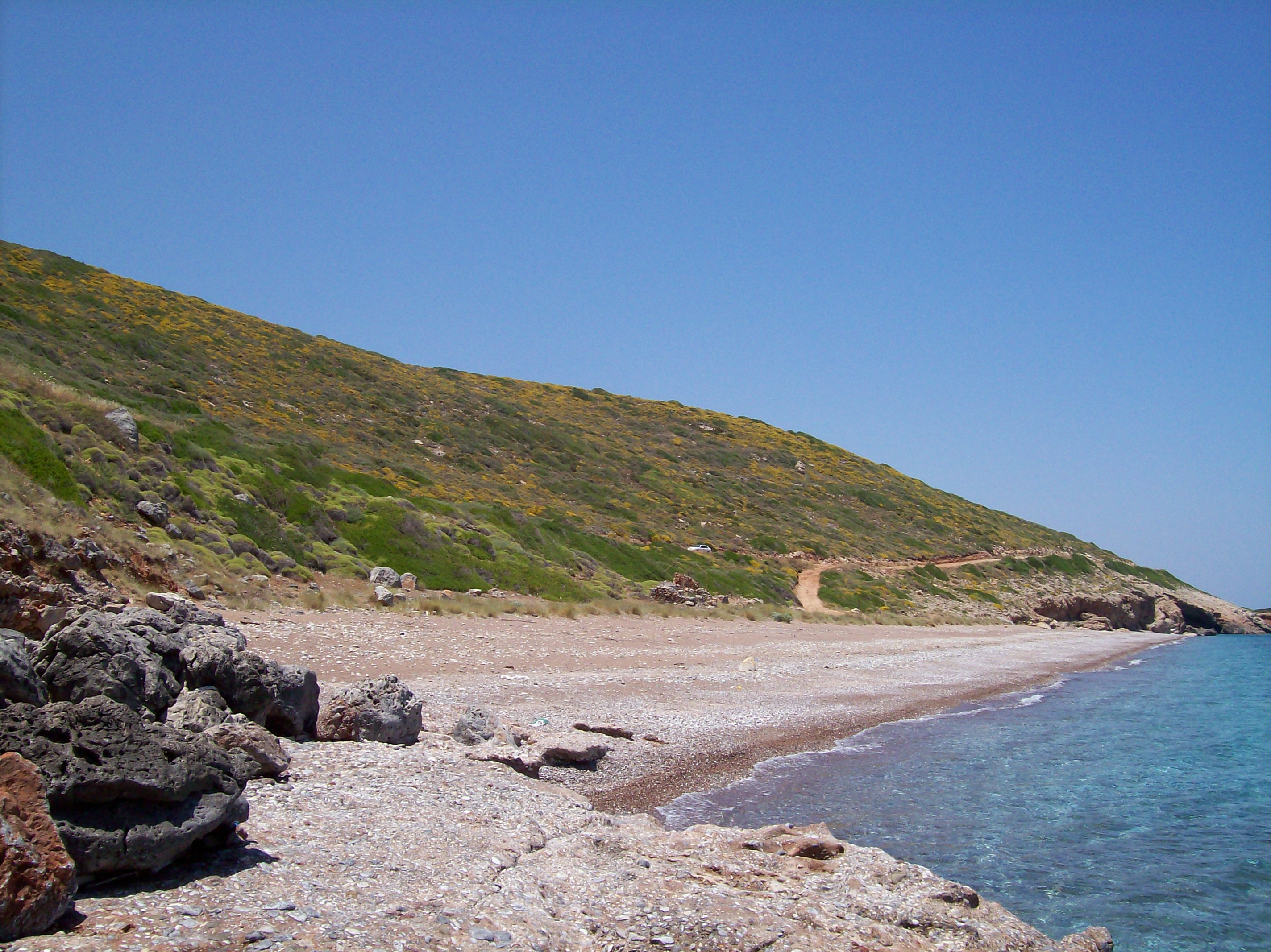 L'une des plages de sable rouge de Firi Ammos, Cythère (Grèce)